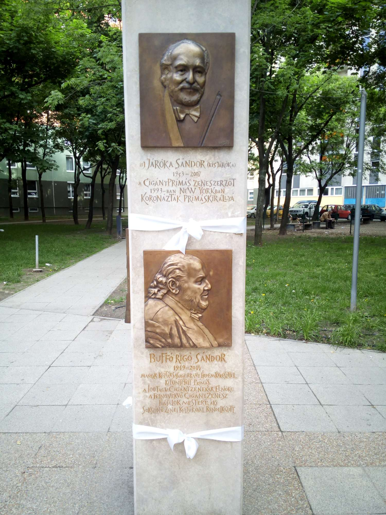 ifj. Járóka Sándor (1953-2007) + Buffó Rigó Sándor (1949-2014) cigányzenész emléktáblája (Budapest, VIII. ker., Muzsikus cigányok parkja)